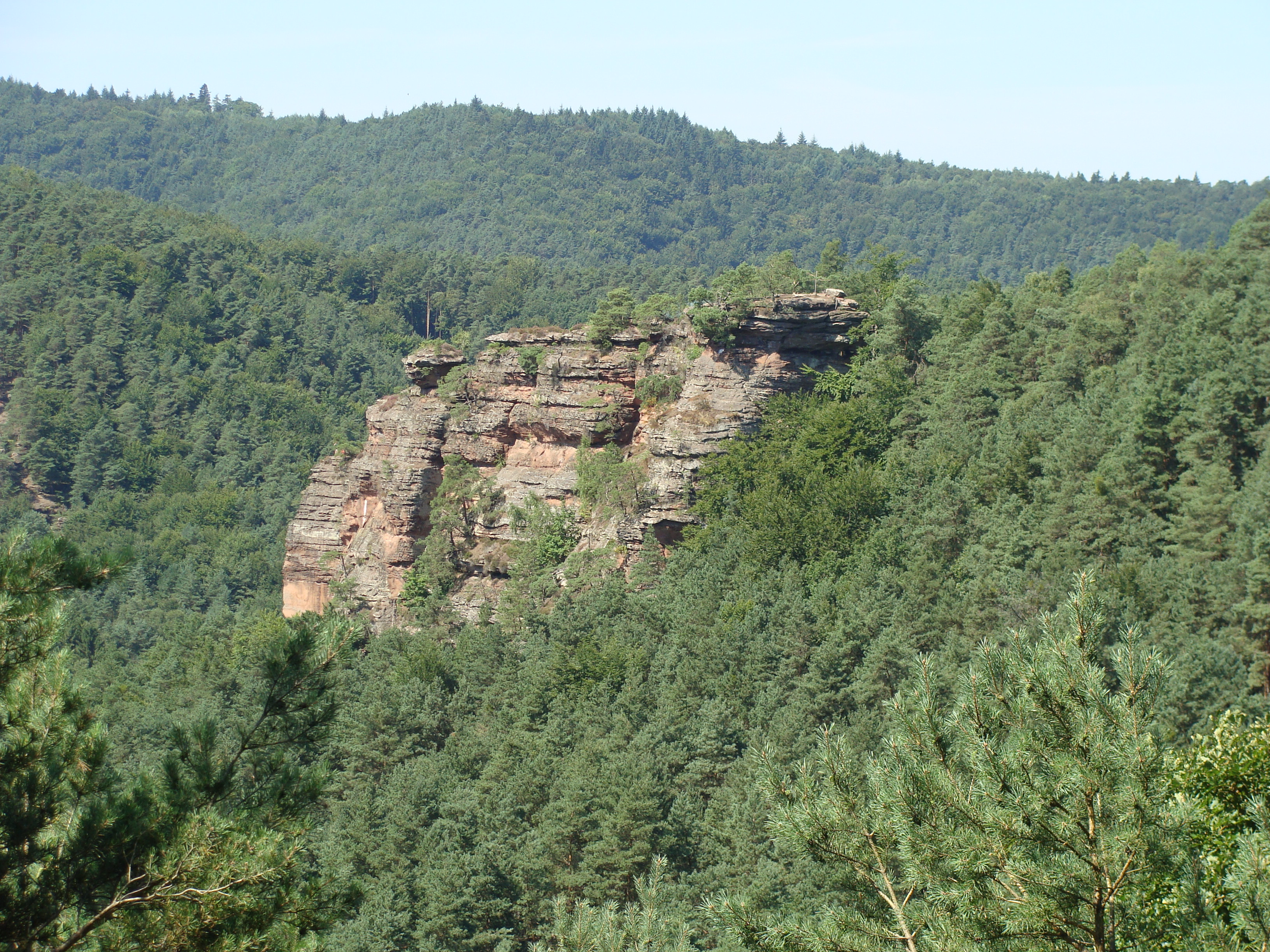 Backelstein bei Hauenstein im Wasgau/Pfälzerwald